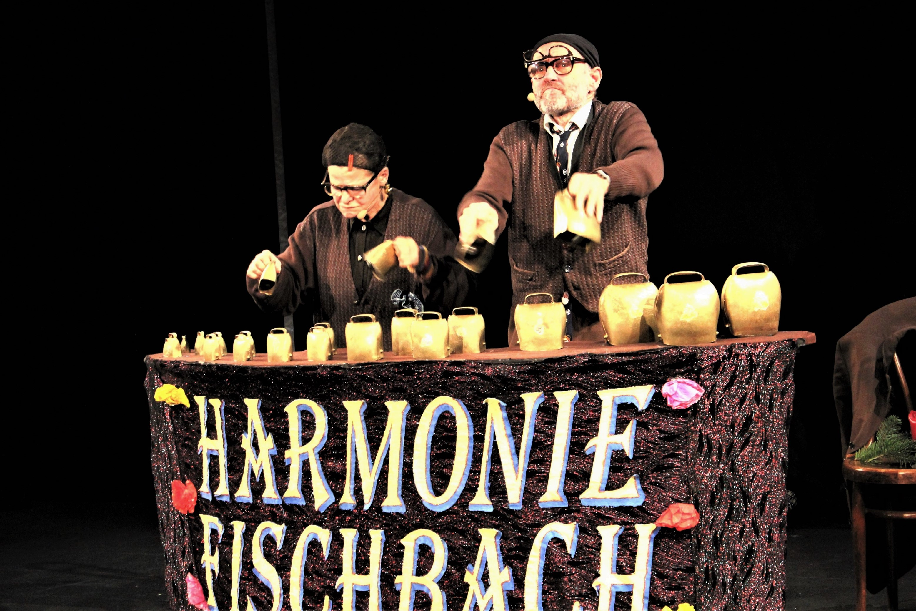 Das Schweizer Komiker-Duo Ernst und Lilian Fischbach (alias Peter Freiburghaus und Antonia Limacher) bei einem Auftritt im von ihnen gegründeten Theater Fischbach in Küssnacht.